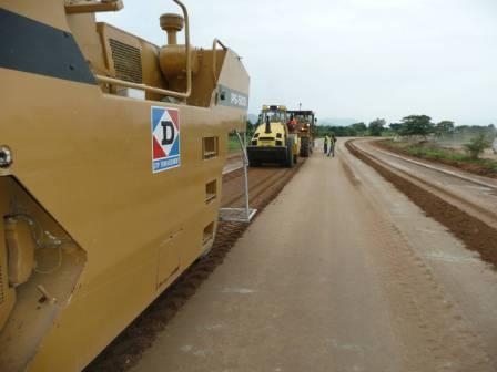 Cameroun RGF